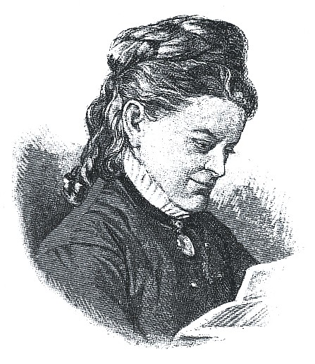 Portrait der Schriftstellerin Ottilie Bach.